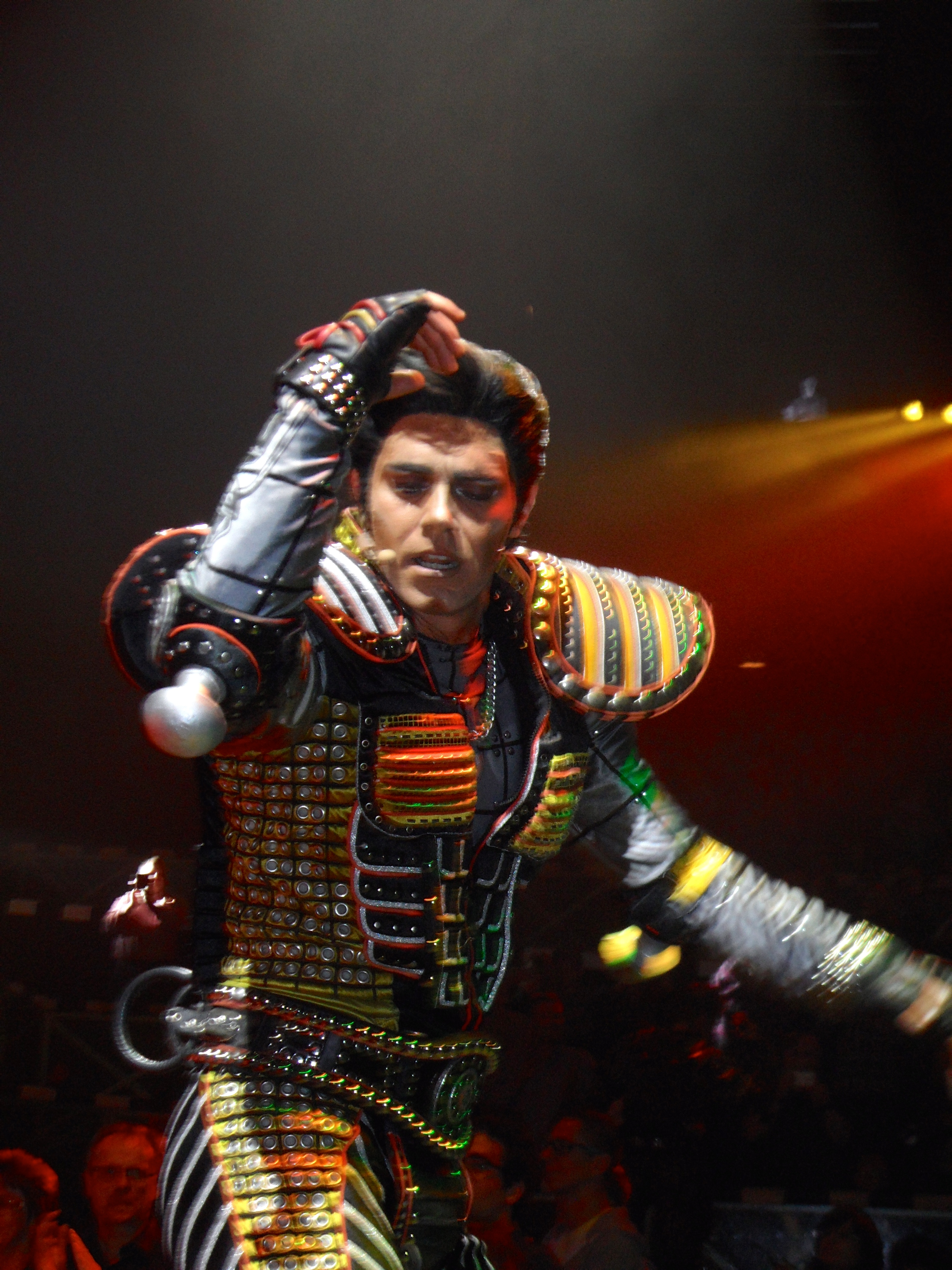 Matthew Goodgame als Greaseball im Starlight Express, Bochum